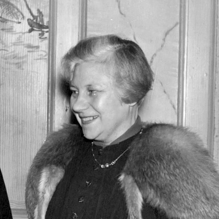 Från årsmötet i Akademiskt bildade kvinnors förening, från vänster Stockholmskretsens ordförande fil. dr. Gertie Söderberg och ordföranden i centralstyrelsen docent Asta Kihlbom.